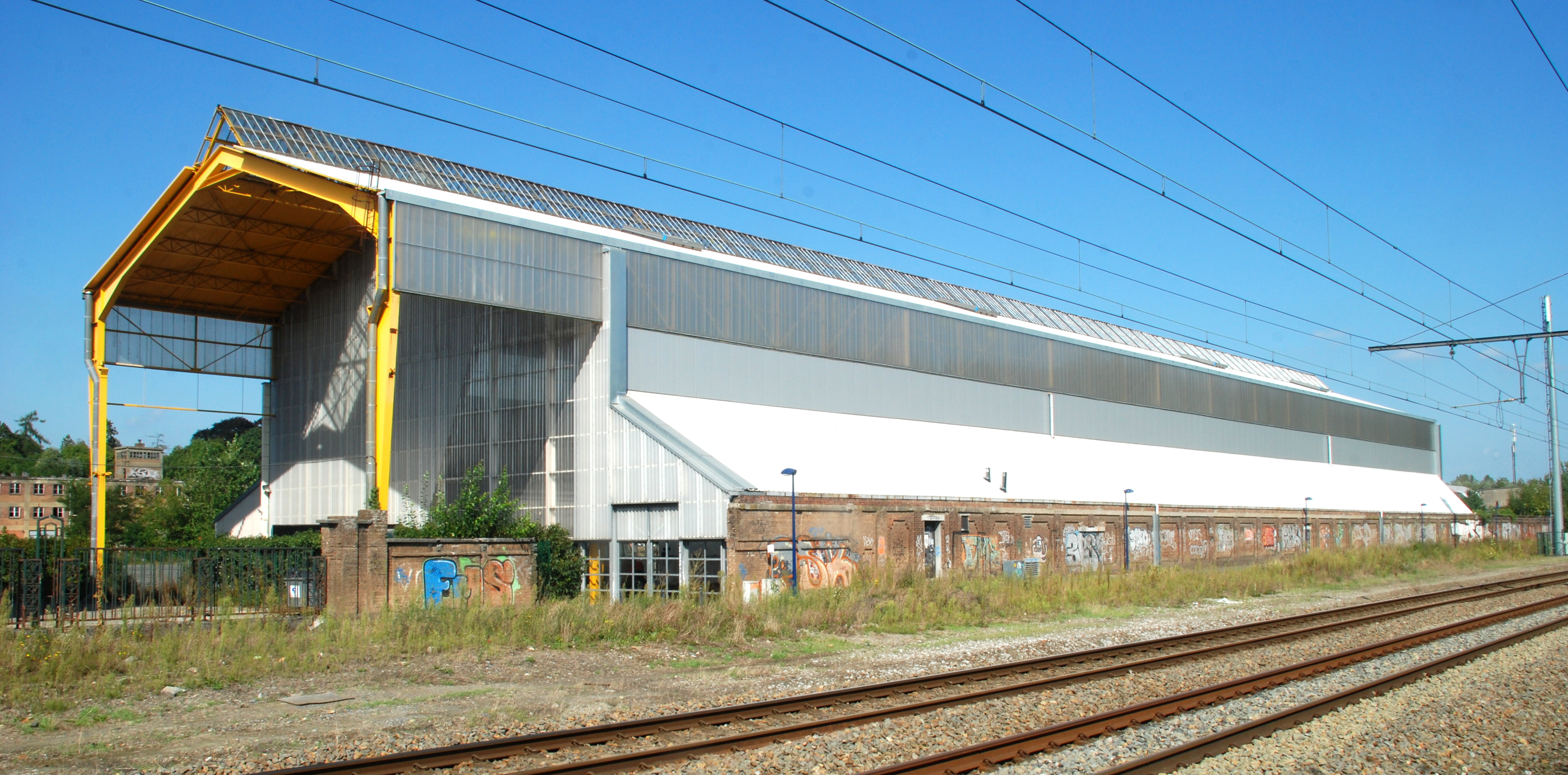 Belgique - Brabant wallon - Court-Saint-Étienne - Anciennes usines Henricot - Parc à Mitrailles